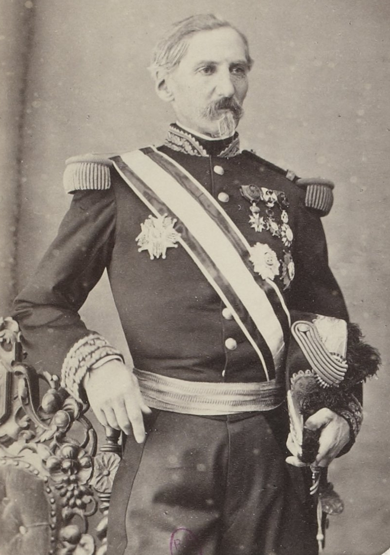 Personnalités françaises et étrangères sous le Second Empire.